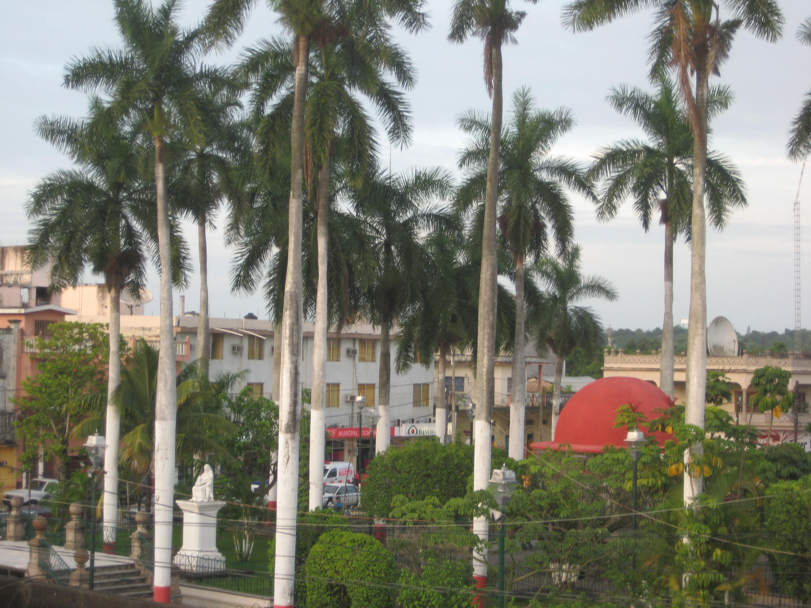 vista al parque — Tempoal, Veracruz.